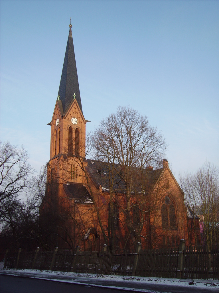 Von Reichenbach nach Greiz kommend ist diese Kirche auf der rechten Seite zu finden